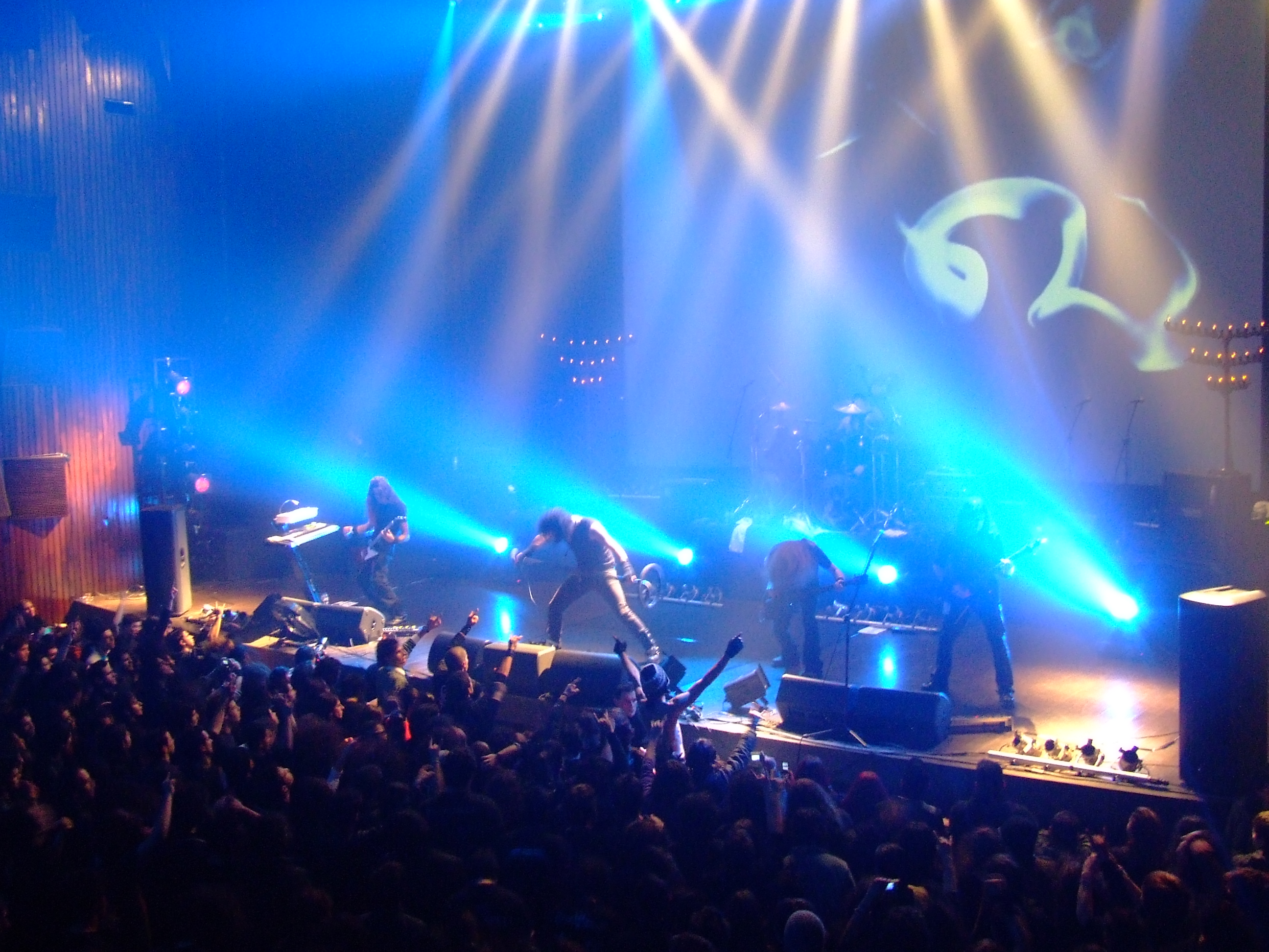 Moonspell no SÃO MAMEDE Centro de Artes e Espectáculos de Guimarães.